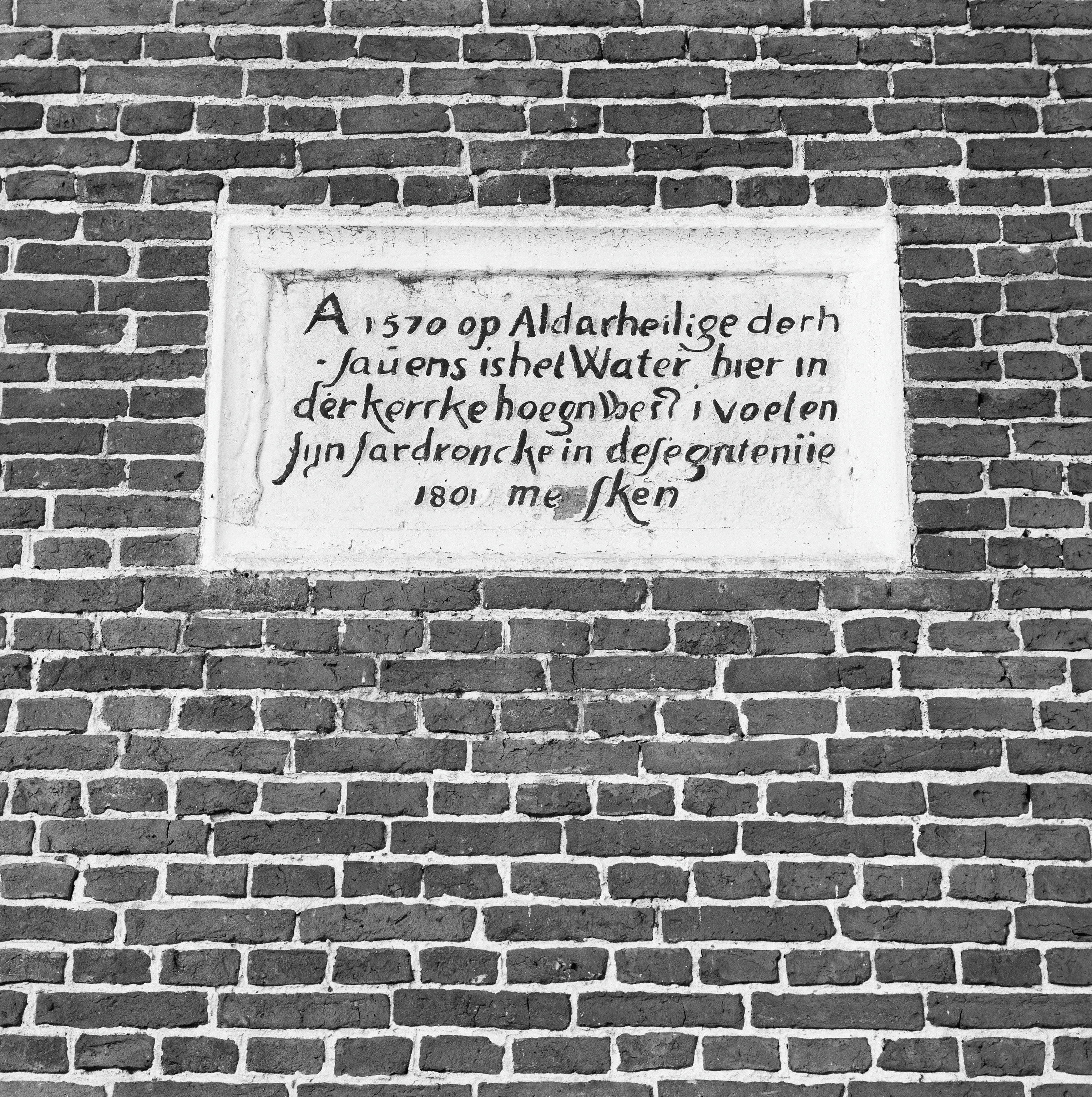 Nederlands Hervormde Kerk: gedenksteen in oostgevel